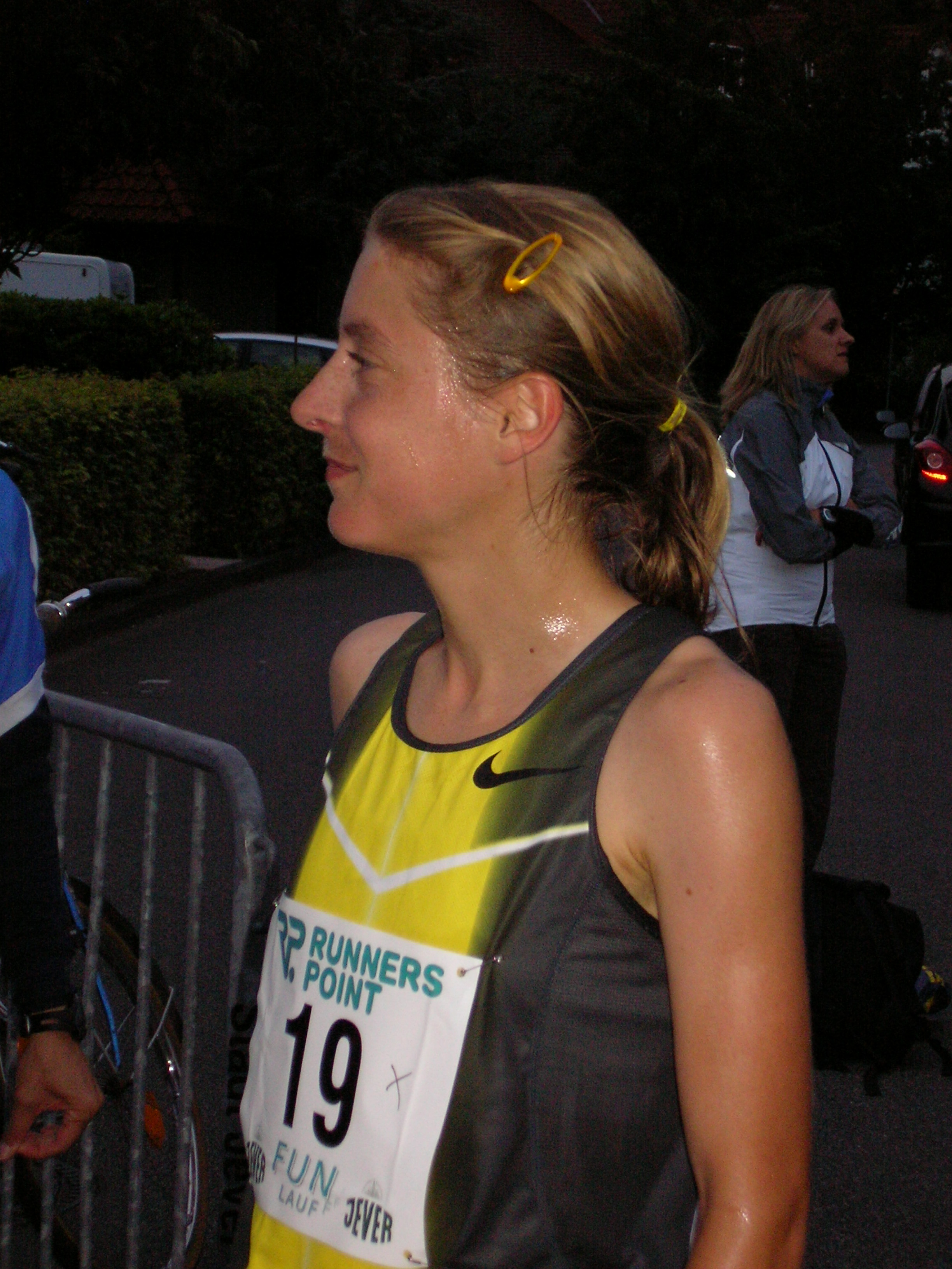 Susanne Hahn 2007 in Schortens